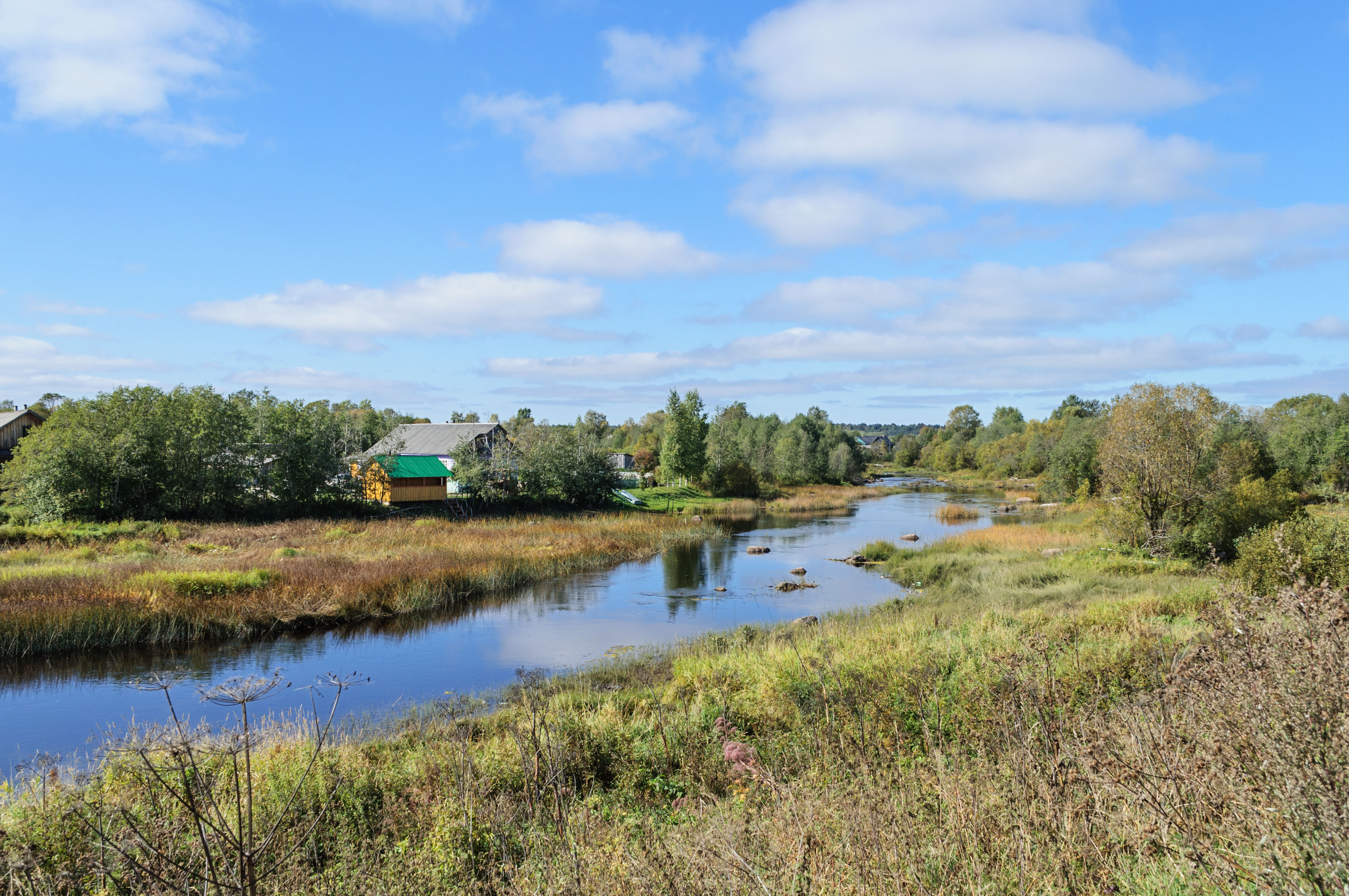 Лачский заказник: на территории Каргопольского сельского лесхоза и юго-западной части озера Лача,Каргопольский район, Архангельская область This image is related to the protected area of Russia number 2910048